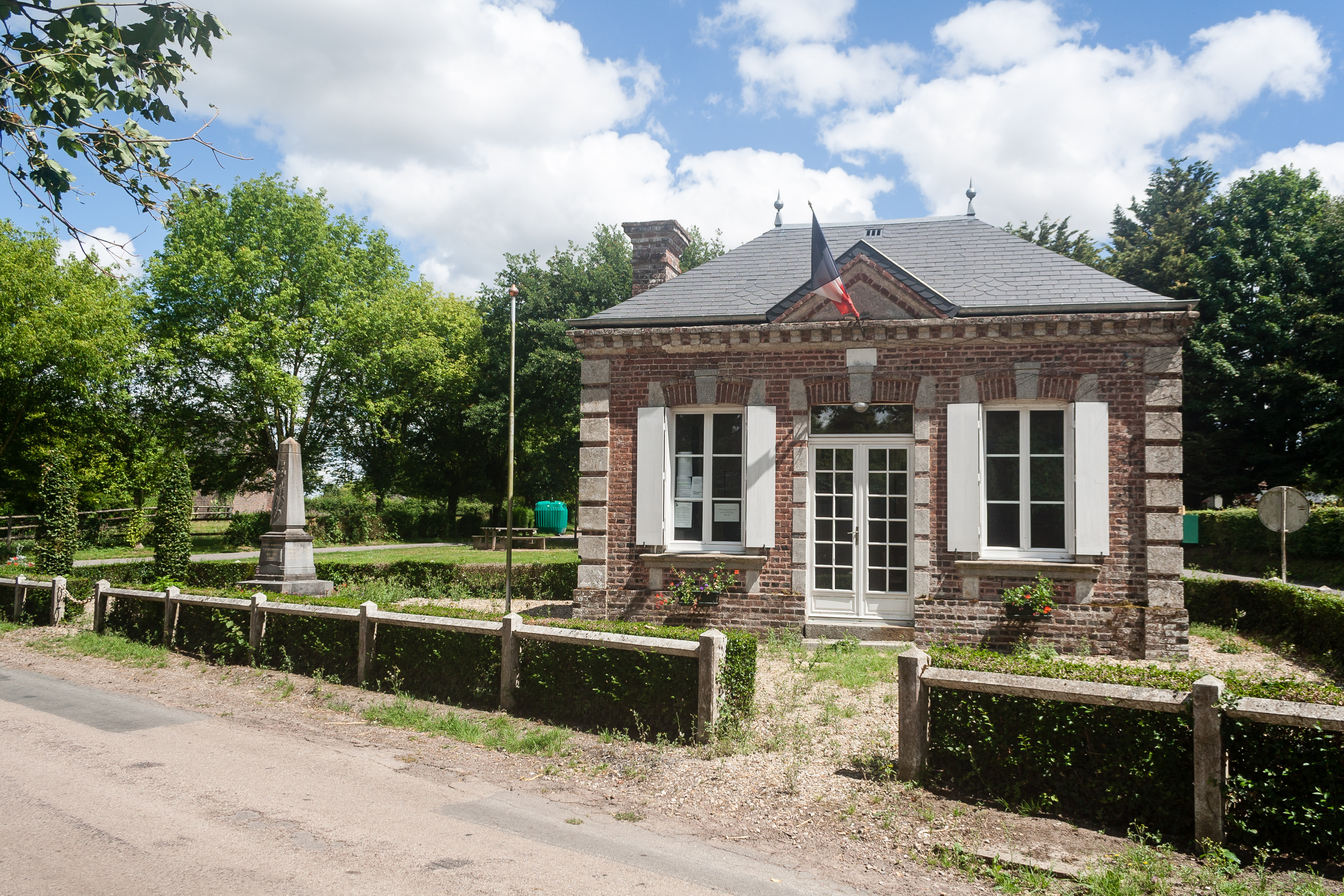 Mairie de Préaux-Saint-Sébastien (France).